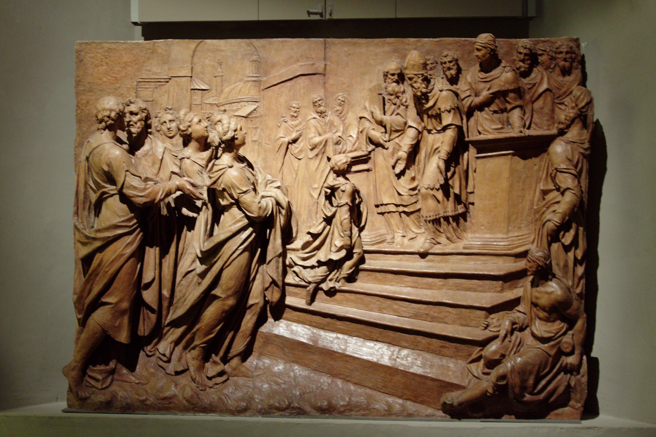 Museu do Duomo - Palazzo Reale - Milão